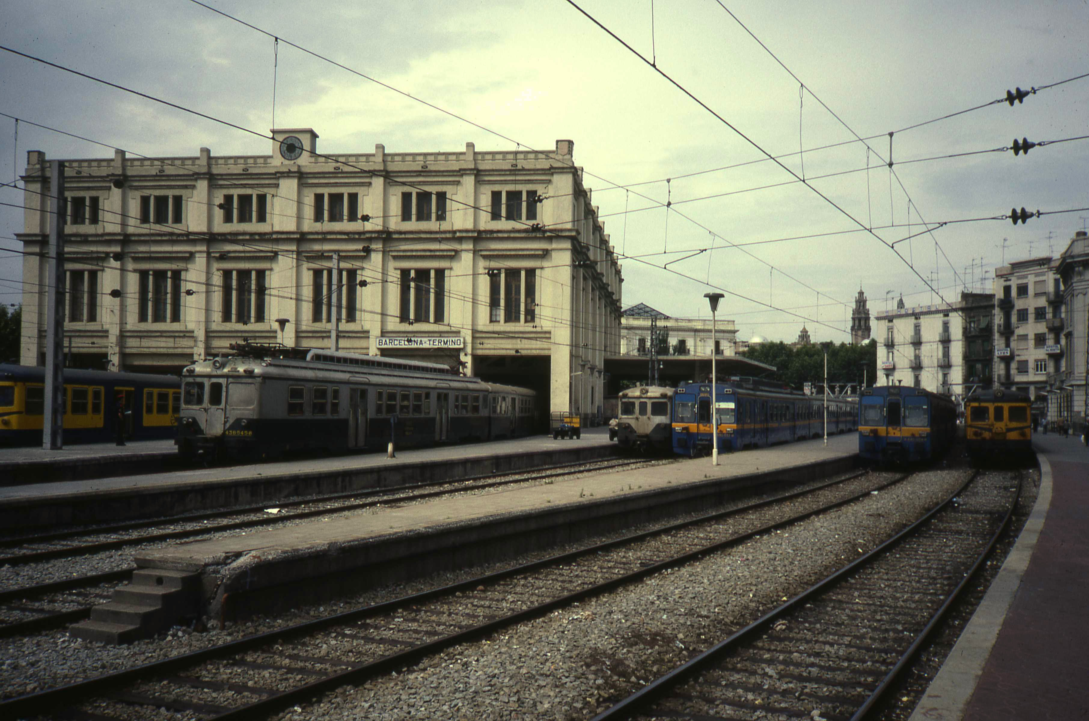 Oude kopstation "Termino" vooraf aan de ombouw voor de olympische spelen.